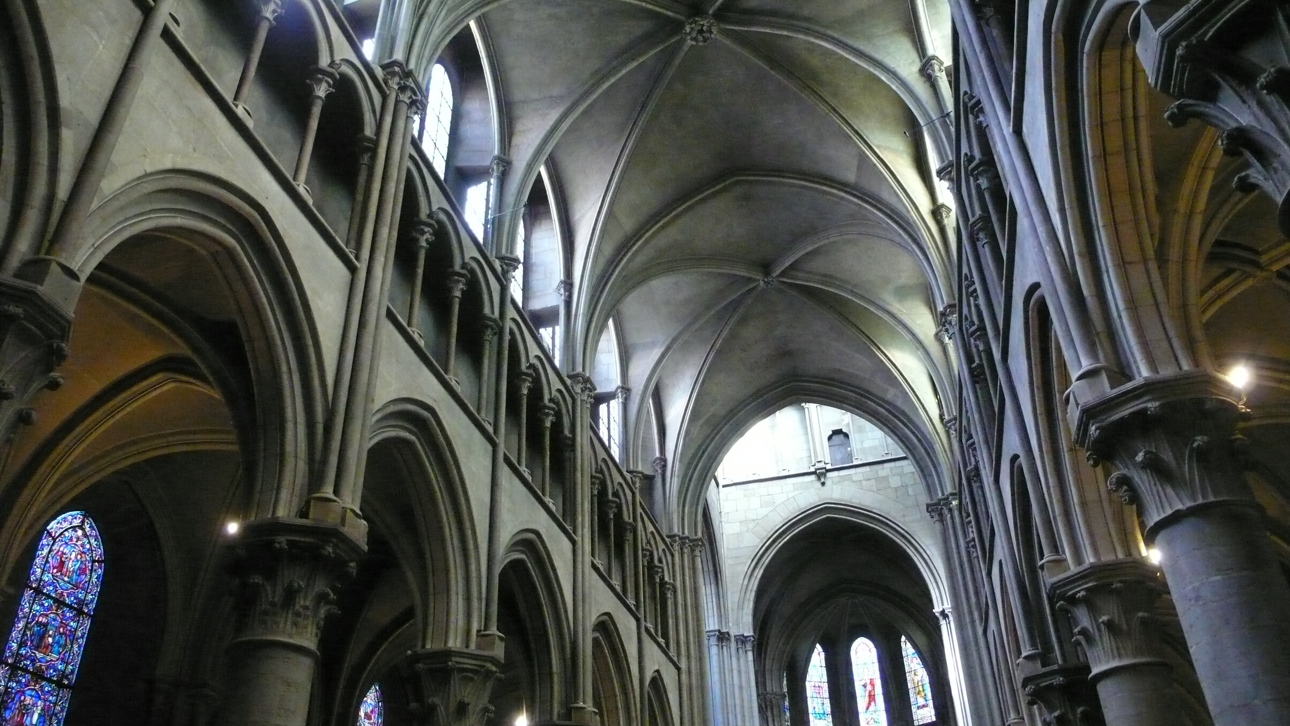 Notre-Dame de Dijon